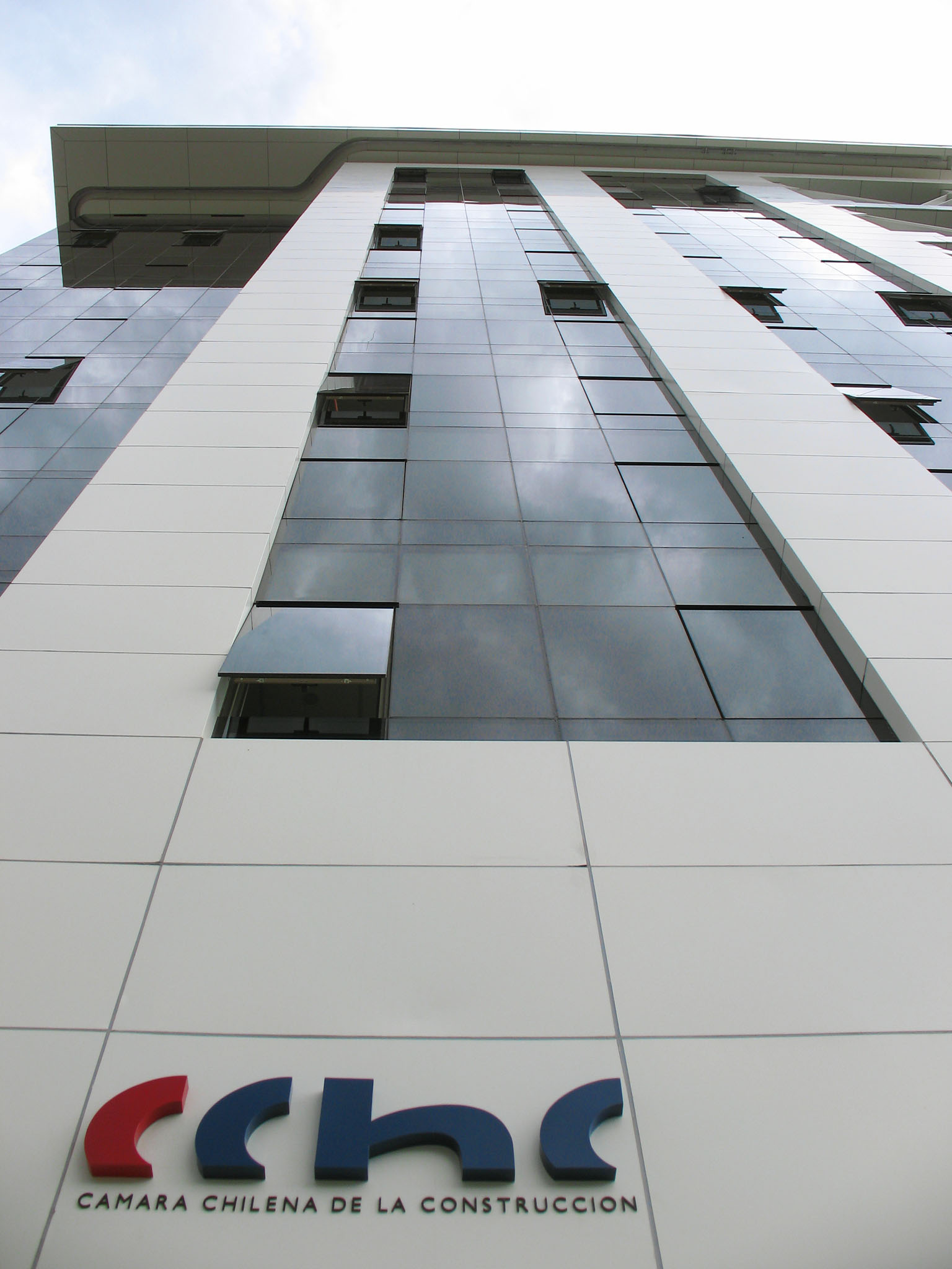 Camara chilena de la construccion